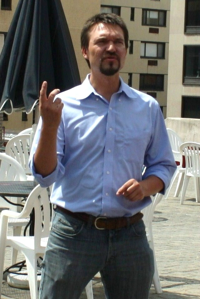 Marcin Firlej, dziennikarz.